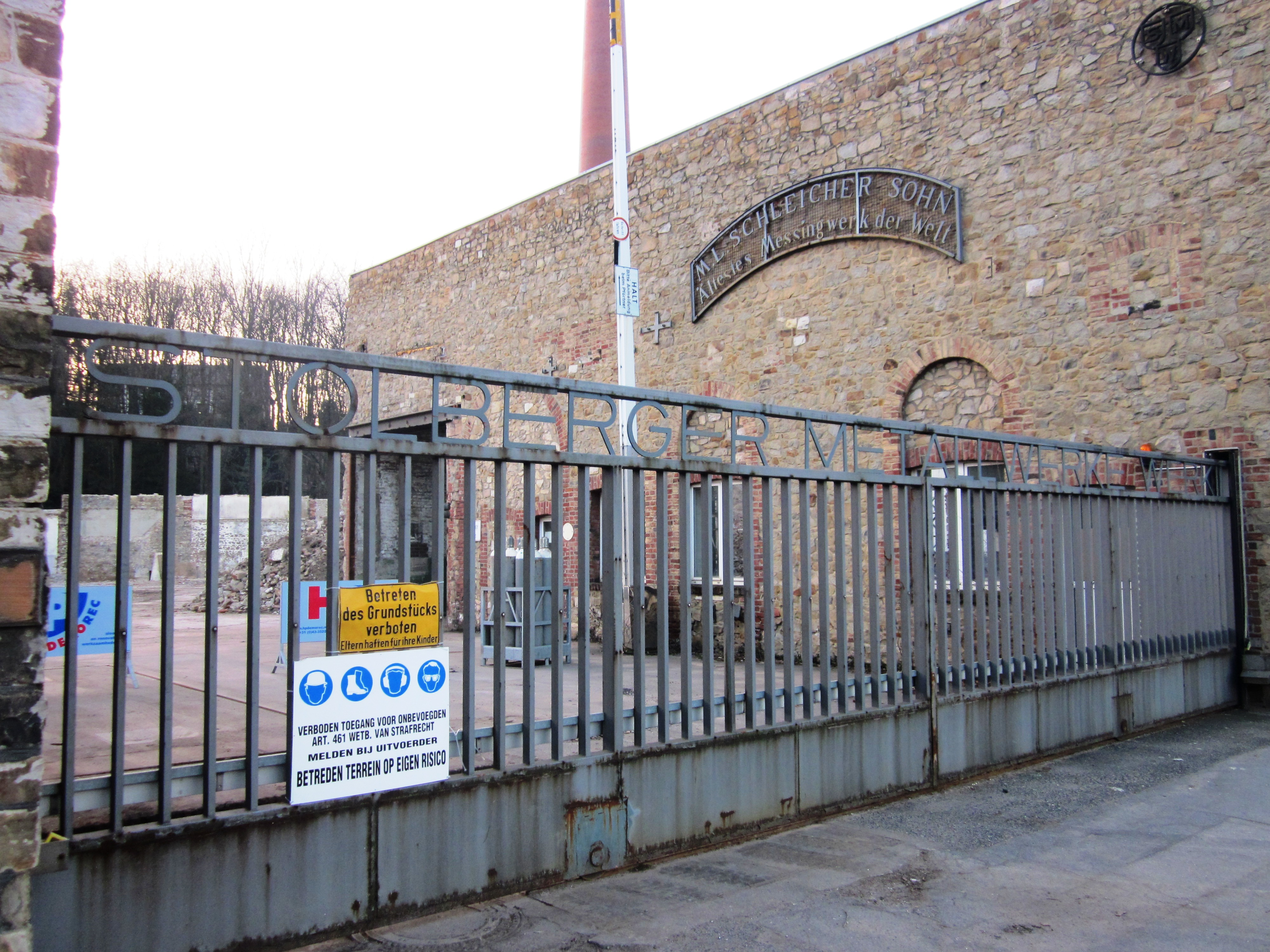 Stolberger Metallwerke an der Eisenbahnstraße in Stolberg, Städteregion Aachen, Nordrhein-Westfalen